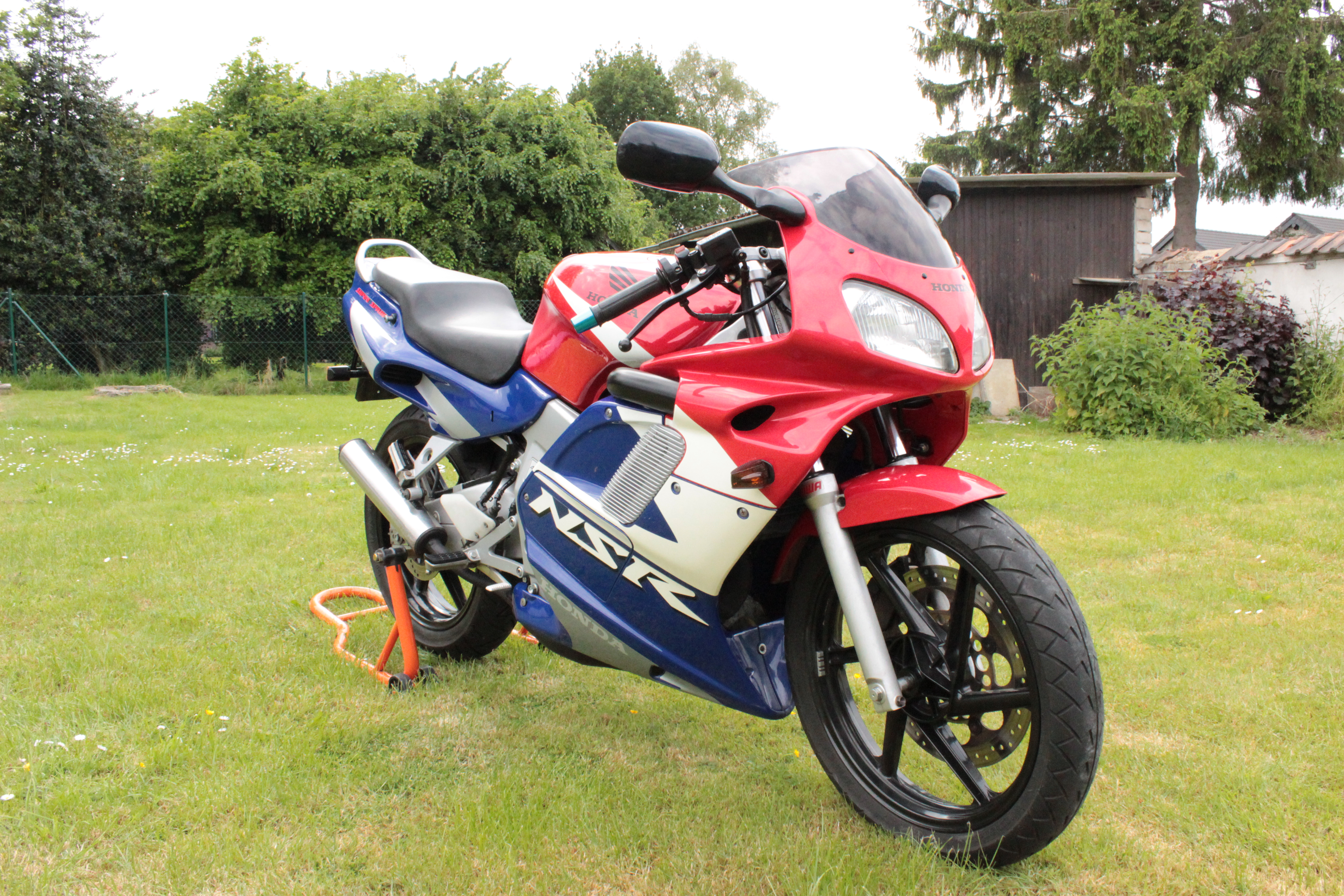 Original NSR 125 vom Typ JC22 aus dem Jahr 2001